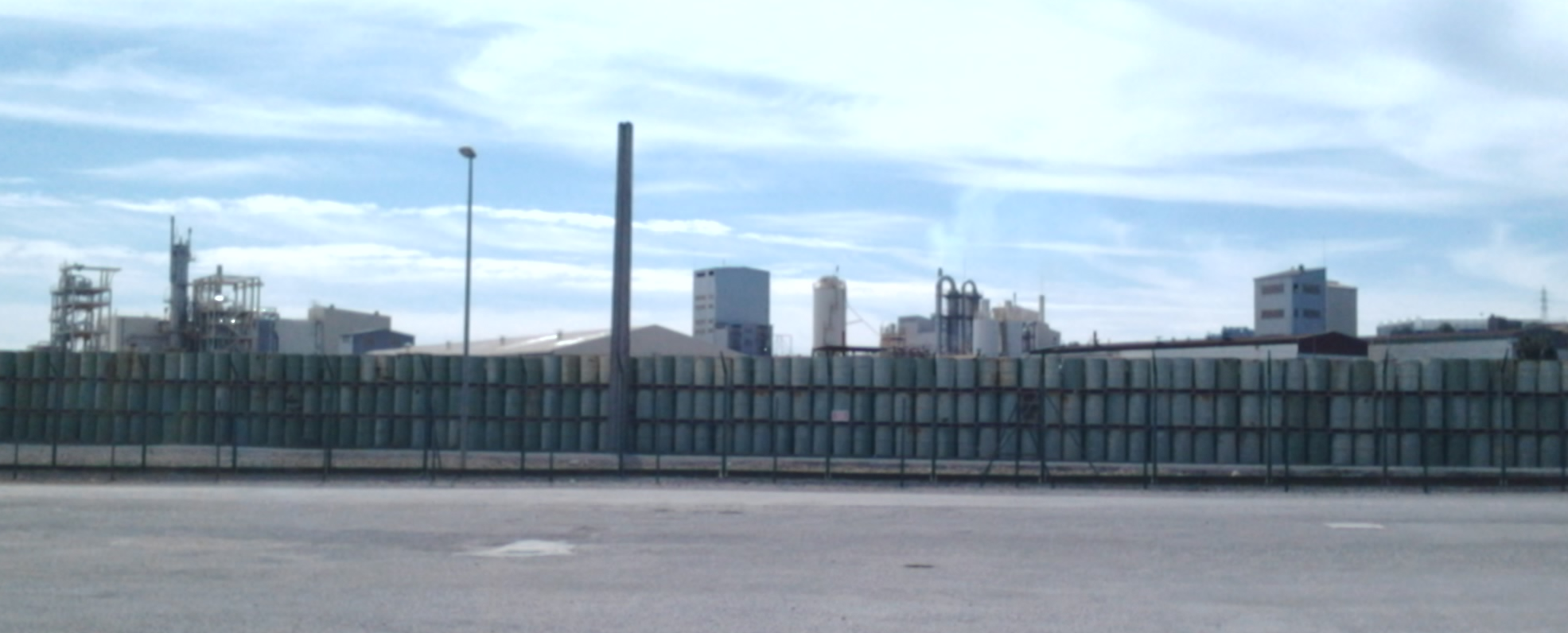 Usine de Malvési derrière une barrière de futs. Vue depuis le chemin d'accès au nord du site.